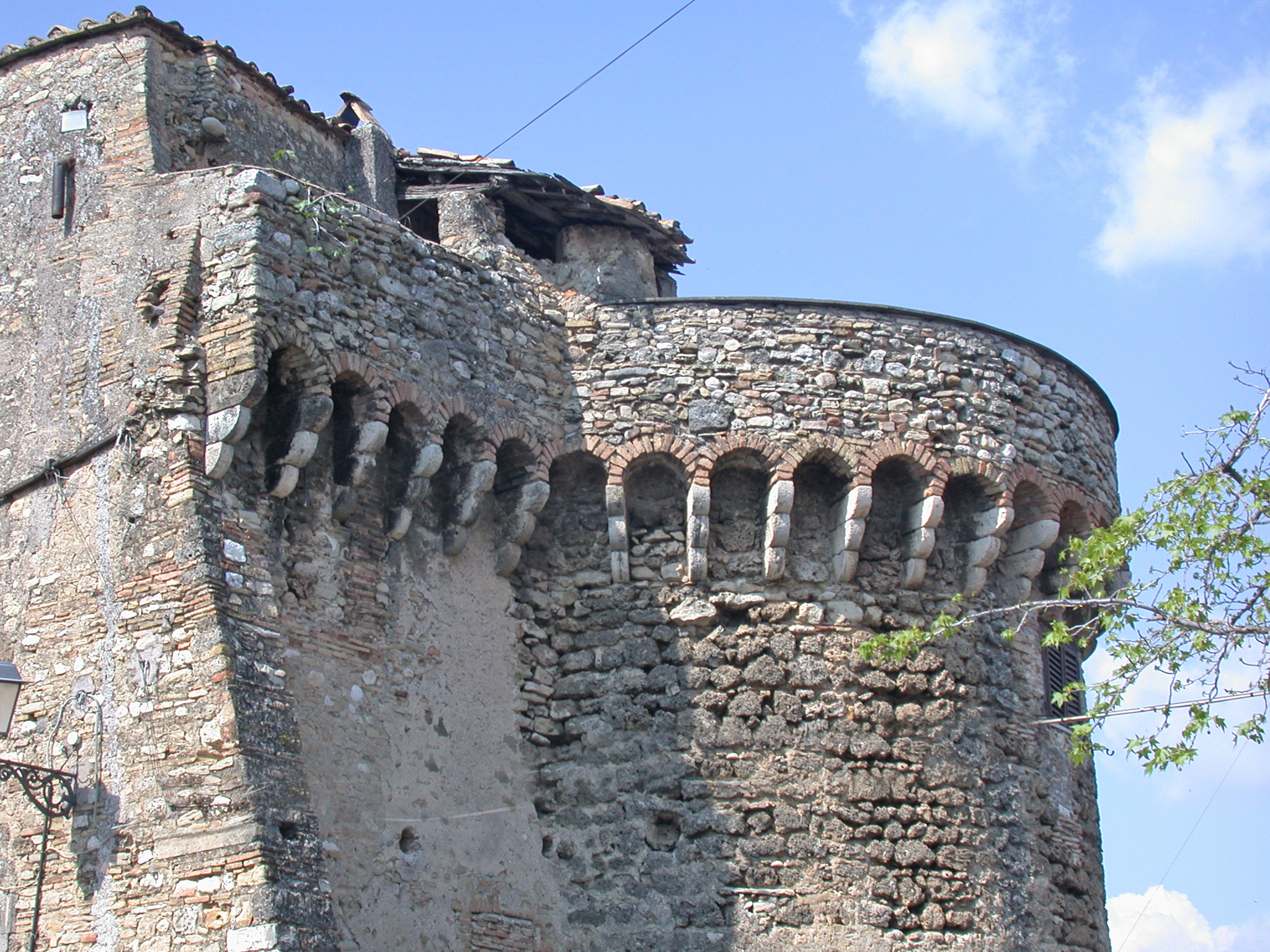 Torre di cinta delle mura di Palazzo Barberini a Montelibretti (già Castello Orsini), in provincia di Roma.